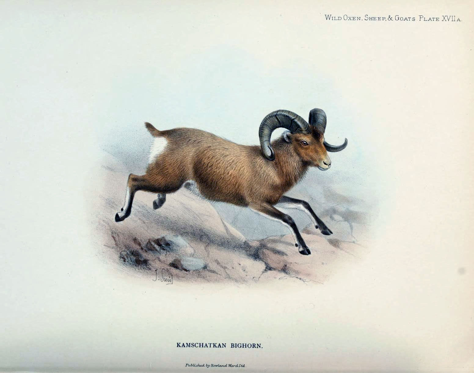 Снежный баран (Ovis nivicola)